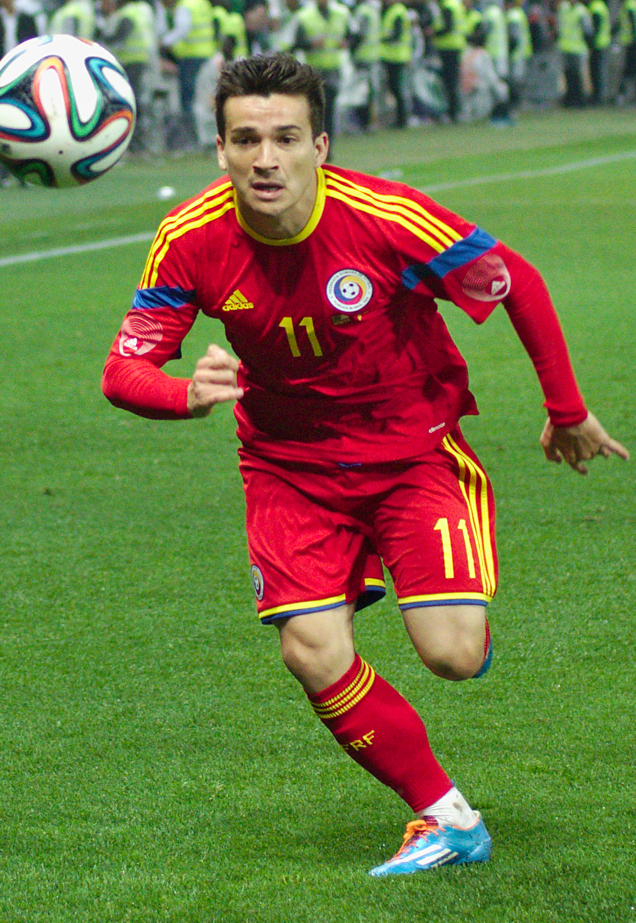 Algérie-Roumanie - 20140604 - Cosmin Matei